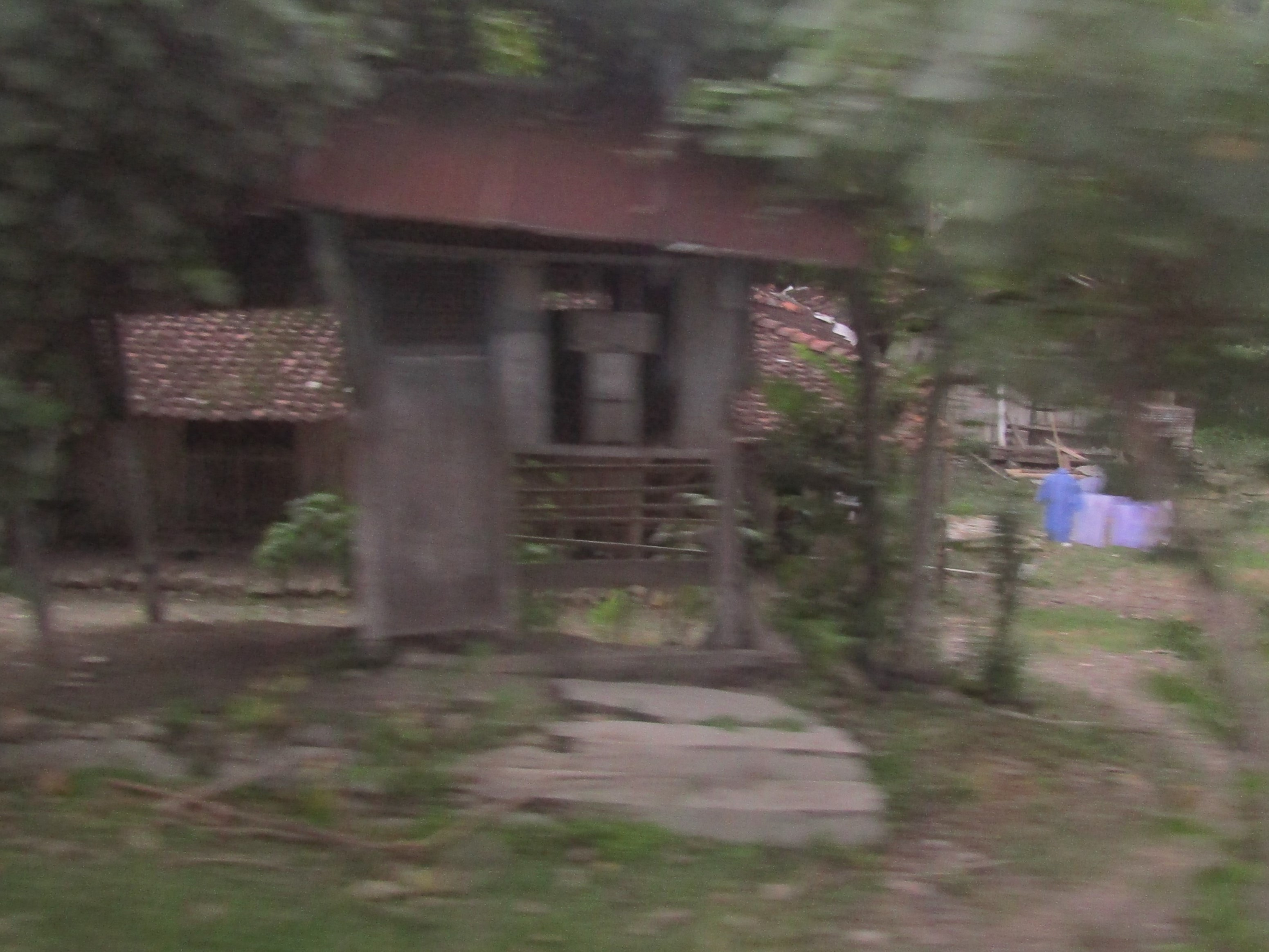 Tampak peron Halte Jambean, 2019